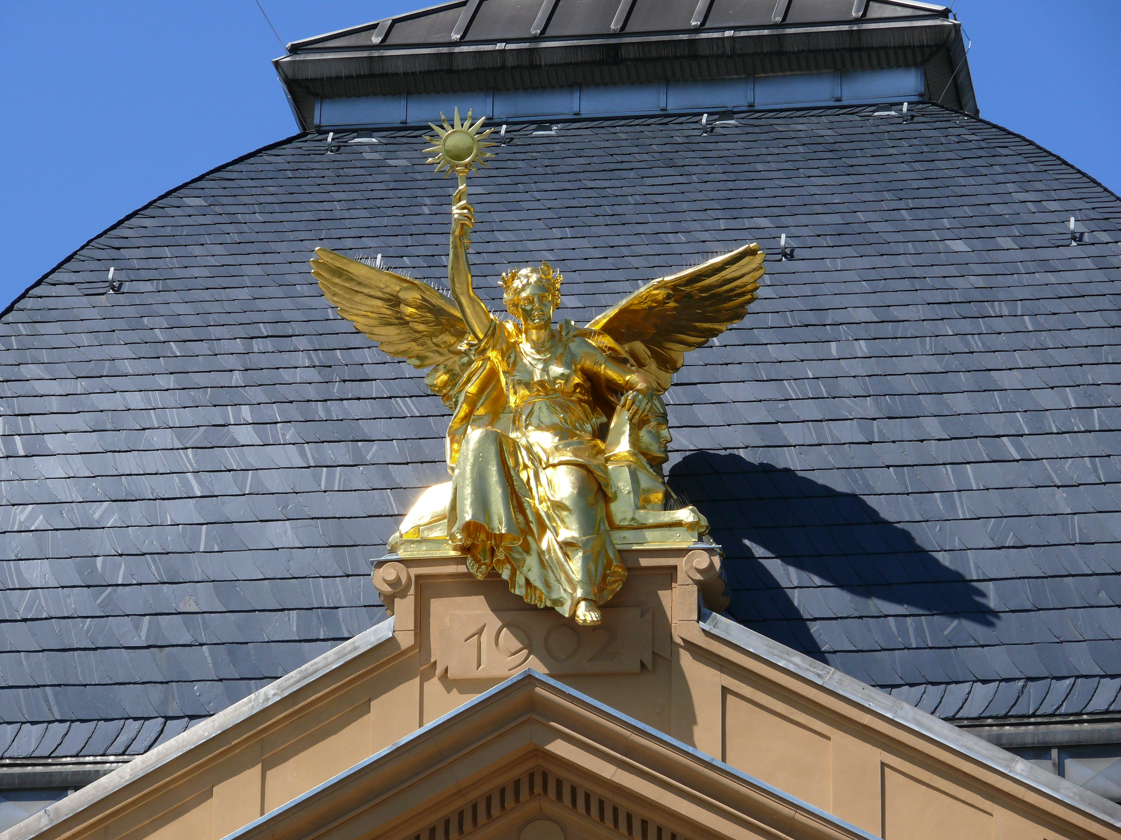 Theater Gera (Großes Haus): Genius auf Sphinx des Bildhauers Achim Meißner